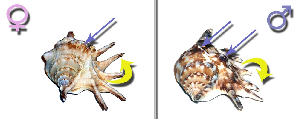 Dimorphisme sexuel du Lambis lambis Auteur : Barruel M. (Photo et infographie)